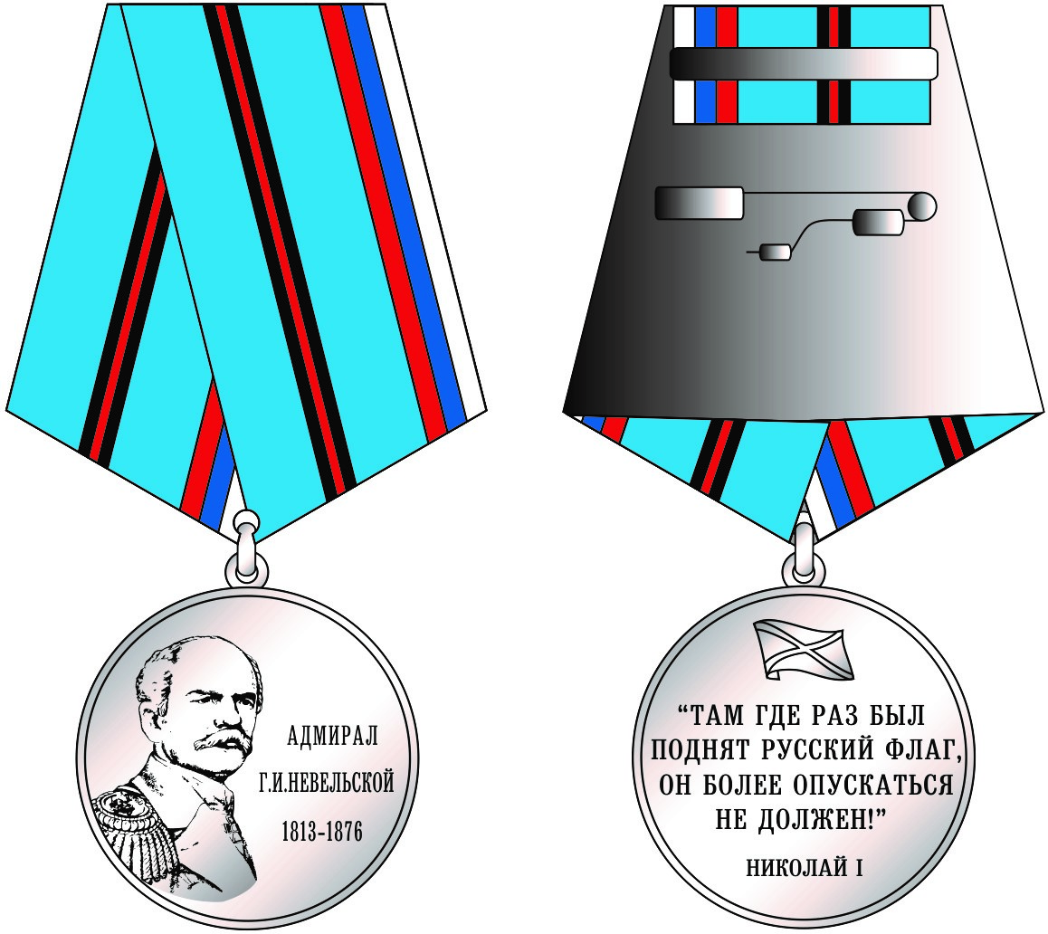 Памятная медаль "Адмирал Г. И. Невельской" учреждена Российским государственным военным историко-культурным центром при Правительстве Российской Федерации 19 сентября 2013 года.